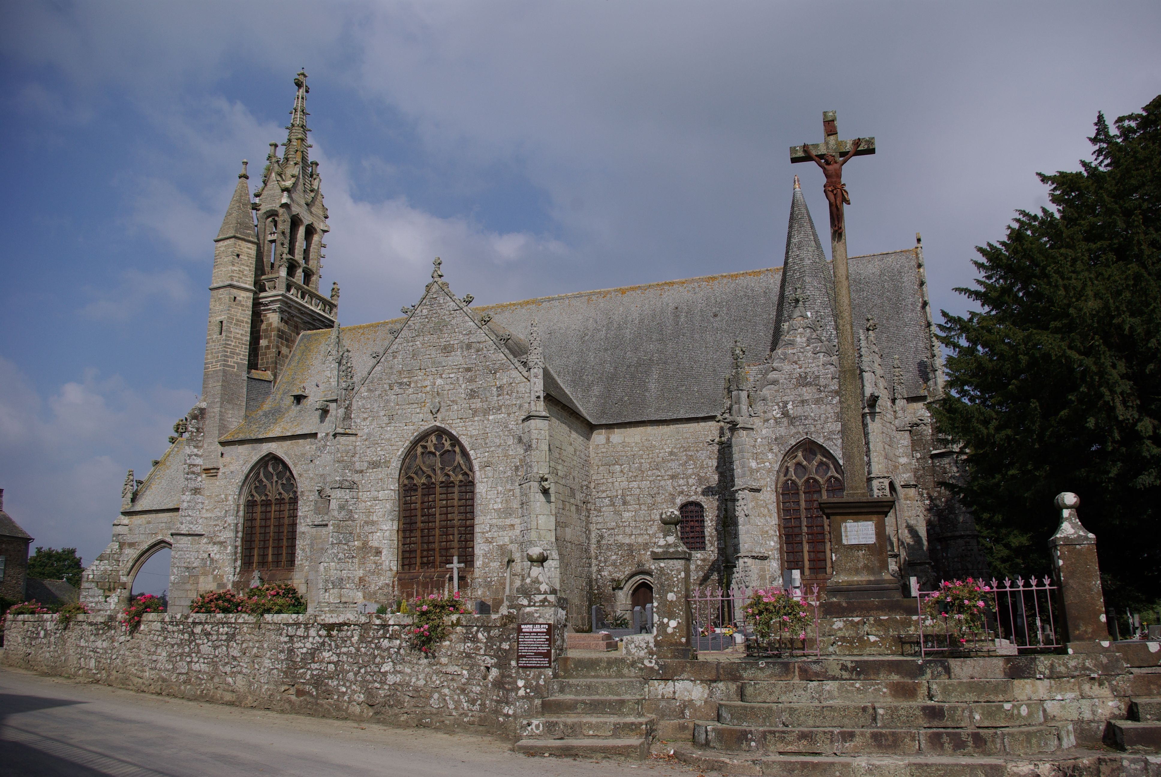 Les Iffs in der Bretagne, Frankreich. Die Kirche Saint Ouen im Ort aus dem 15. Jahrhundert (geotags in den EXIF-Daten).